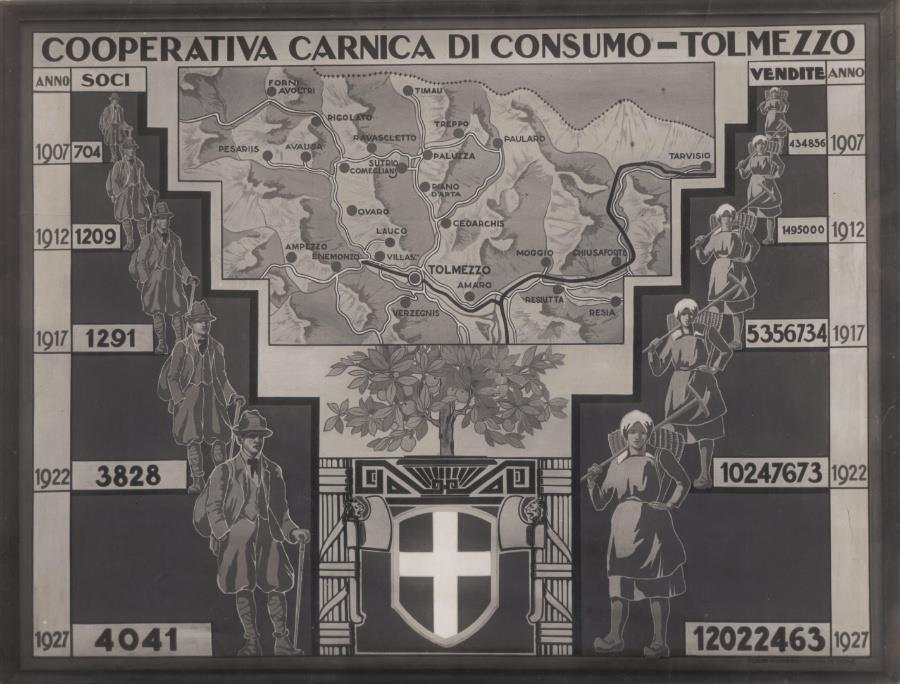 marchio della CoopCa